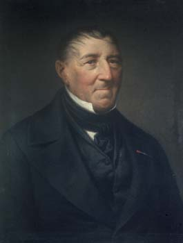 Joseph von Stichaner, langjähriger Regierungspräsident der Pfalz